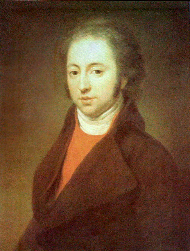 Портрет Ивана Николаевича Тютчева, отца поэта Ф. И. Тютчева. Холст масло.